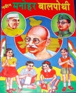 वर्णमाला पुस्तक